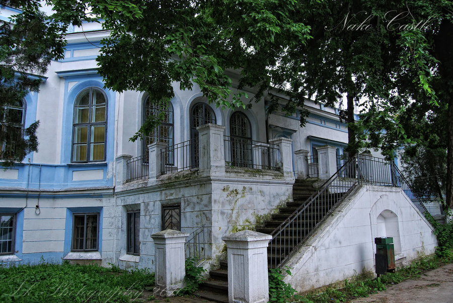 Sannicolau Mare, jud Timis Cod LMI TM-II- m-A-06287